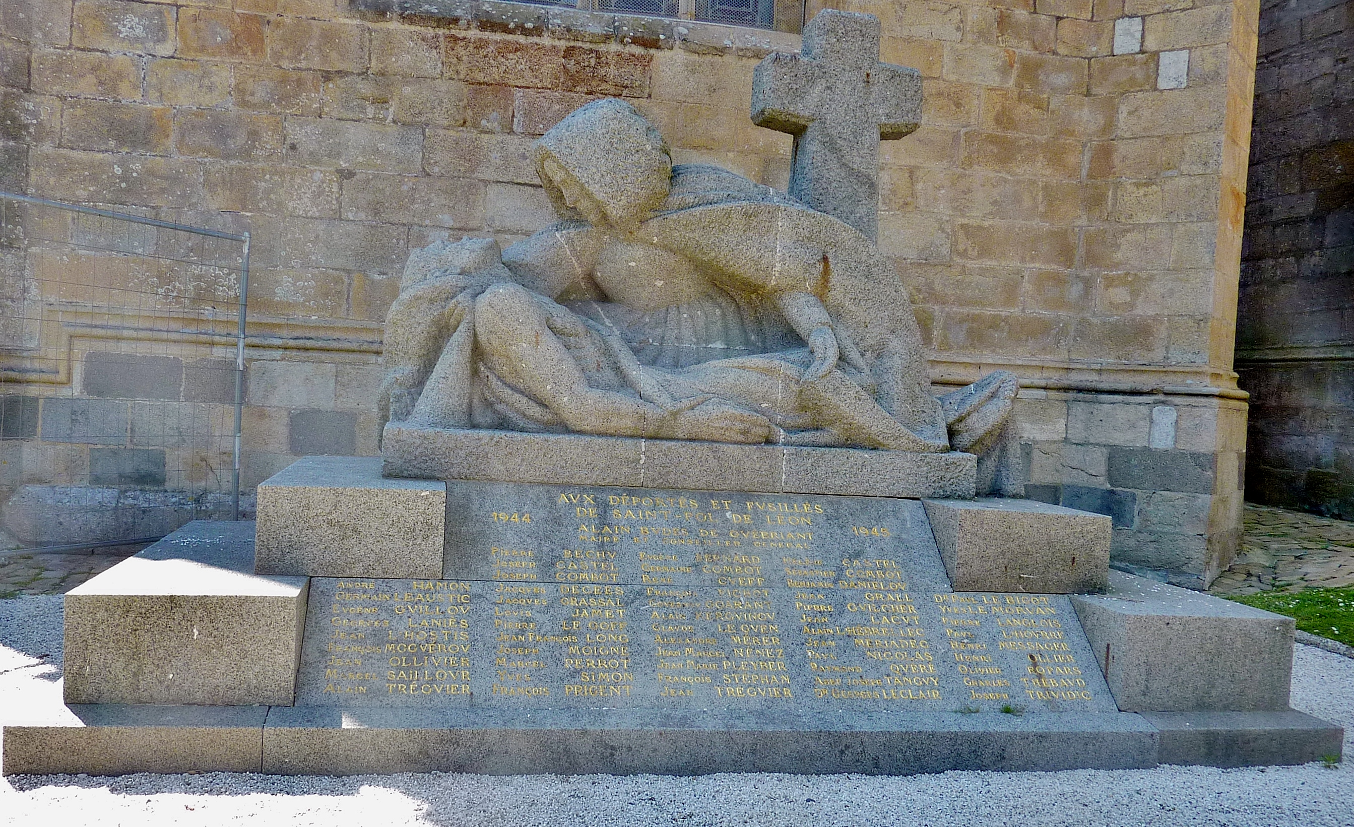 Saint-Pol-de-Léon : le monument aux morts aux déportés et fusillés.